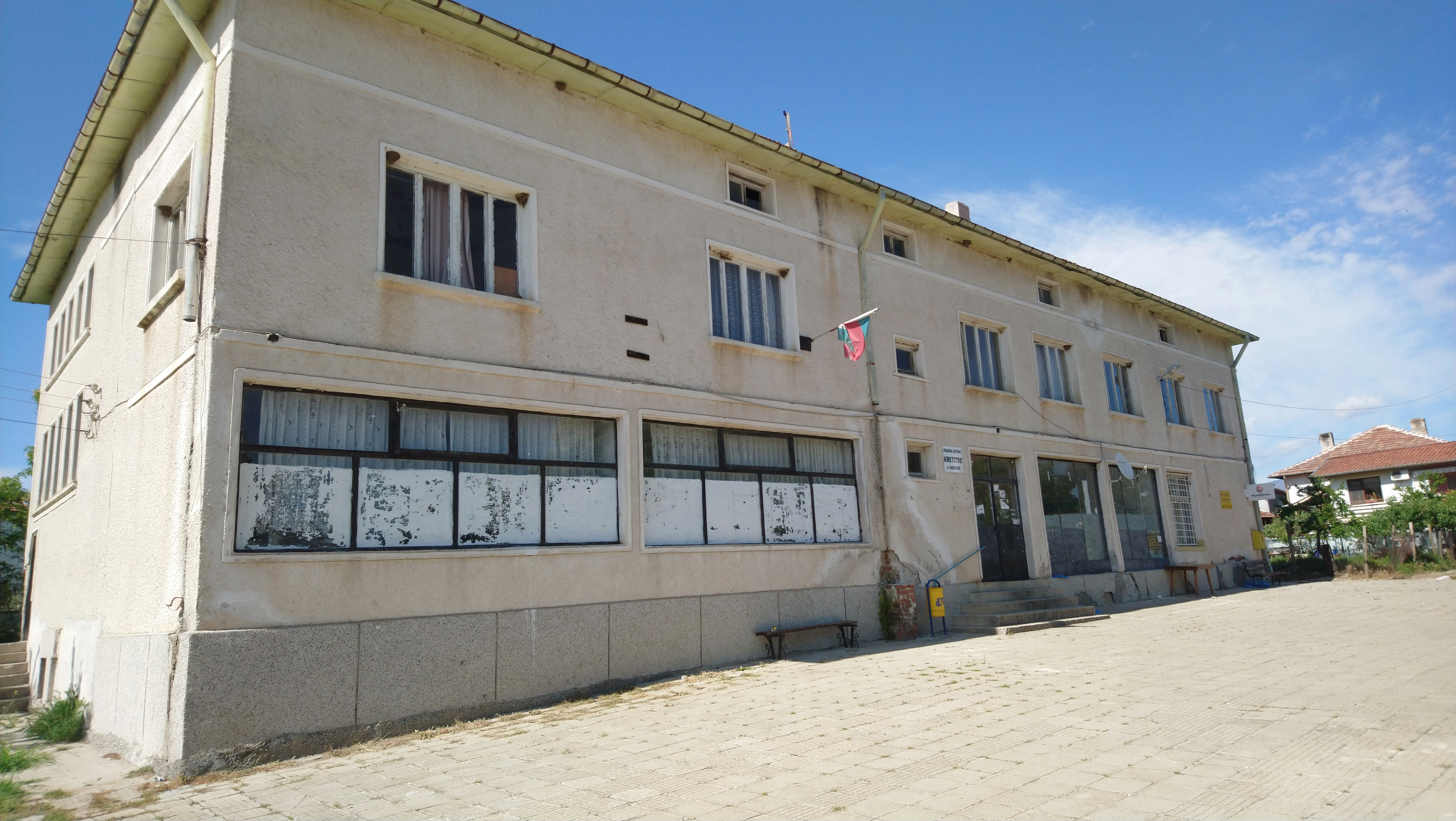 Кметството на село Капатово, Община Петрич